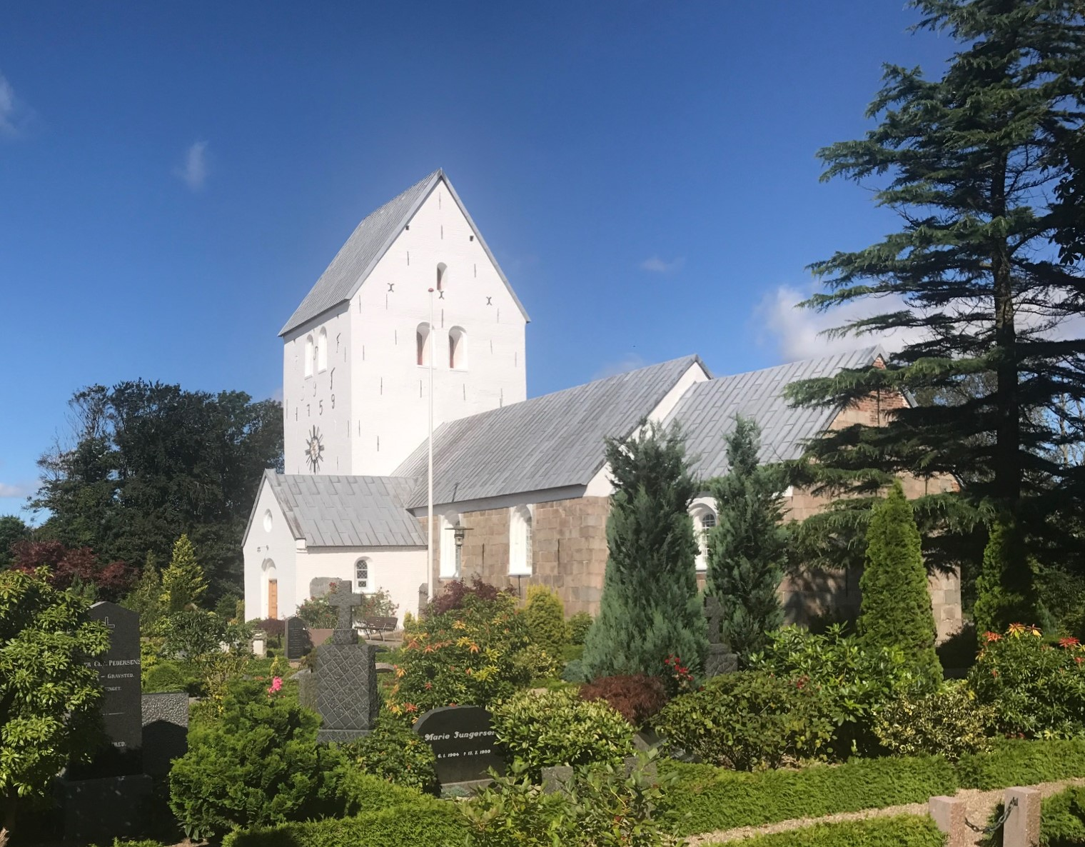 Church in Klokkerholm, DK